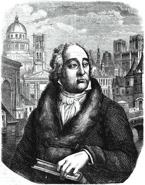 "Dulaure".